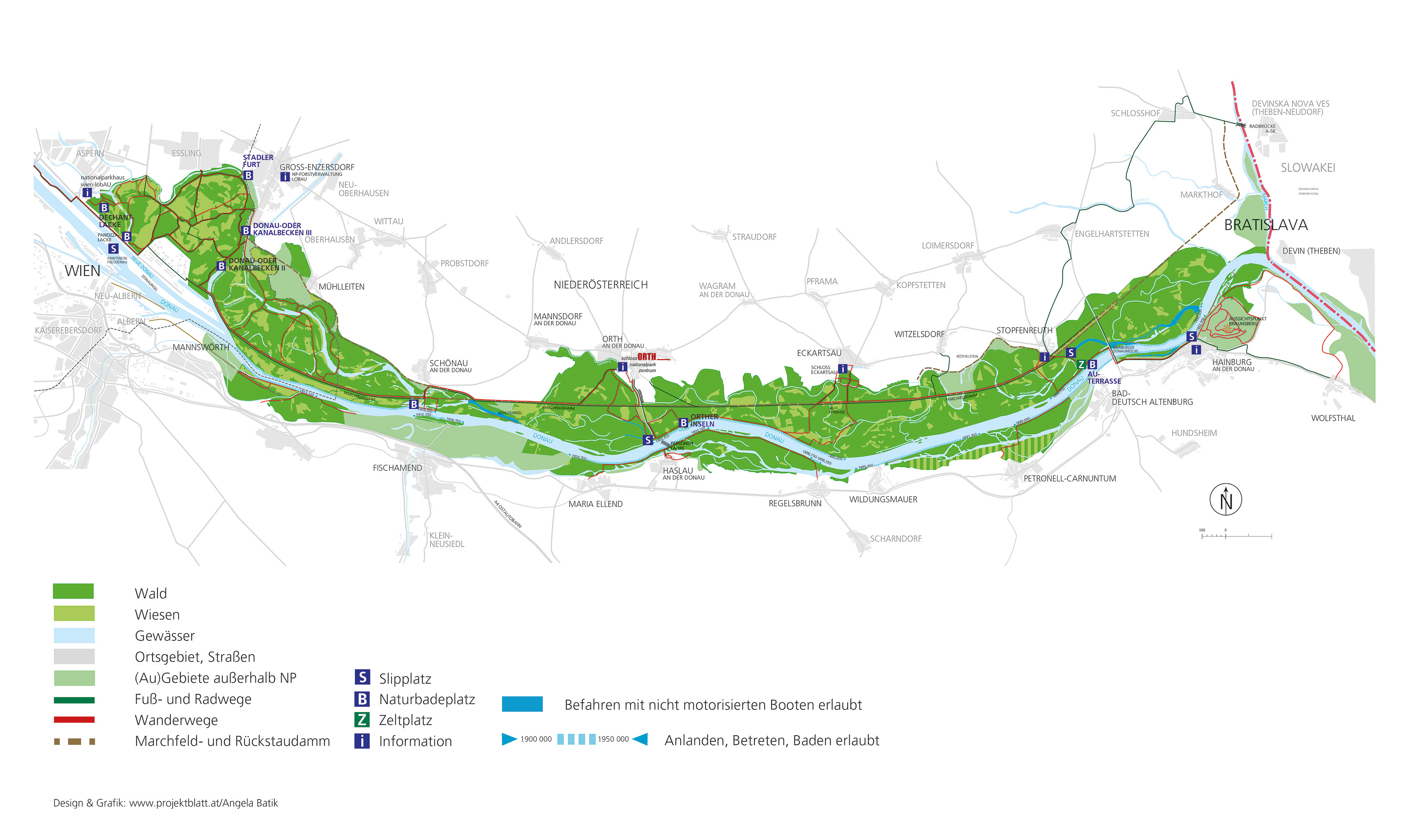 Karte Nationalpark Donau-Auen